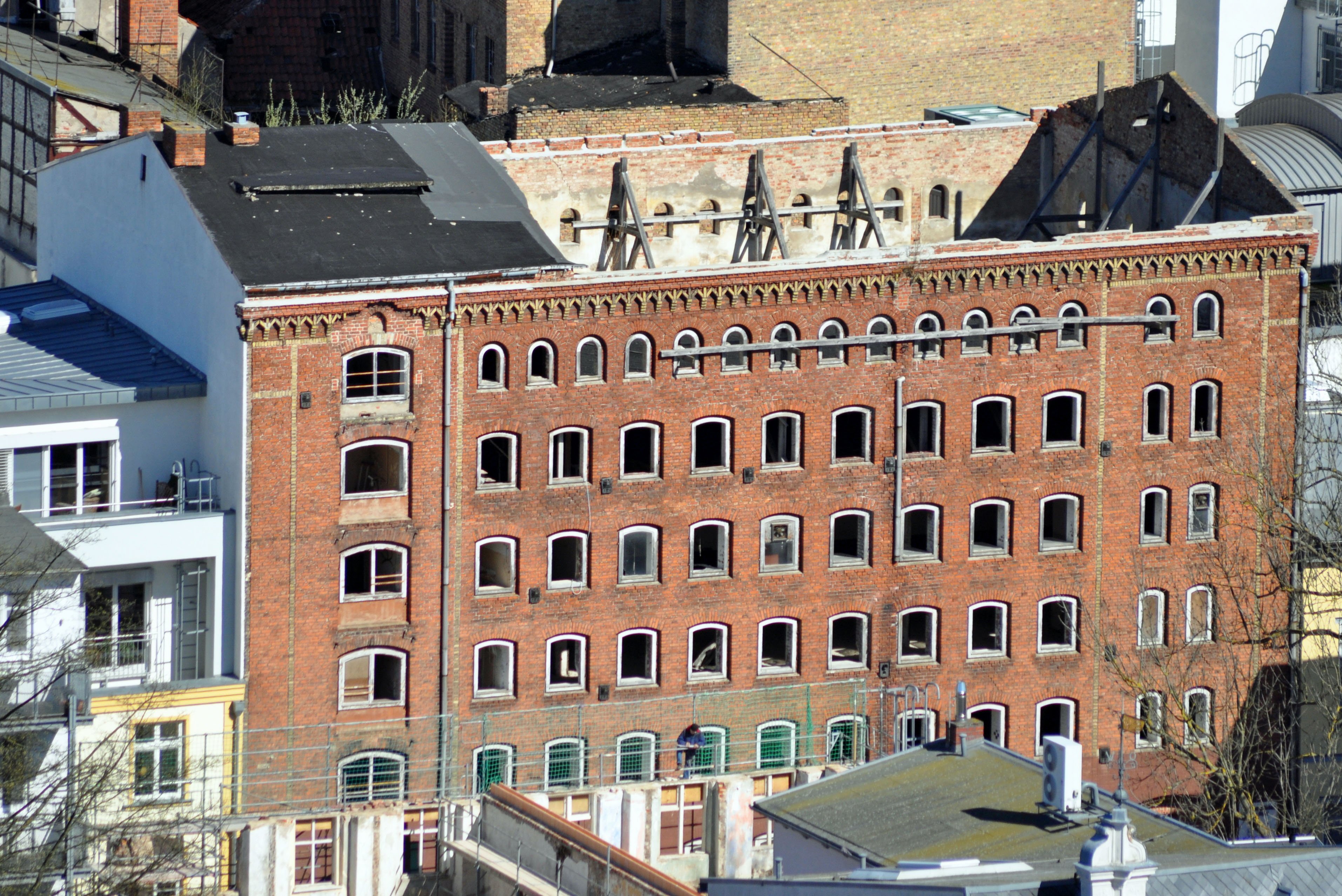 Gebäude bzw. Gebäudedetail in Stralsund. Straße und Hausnummer siehe Dateiname.